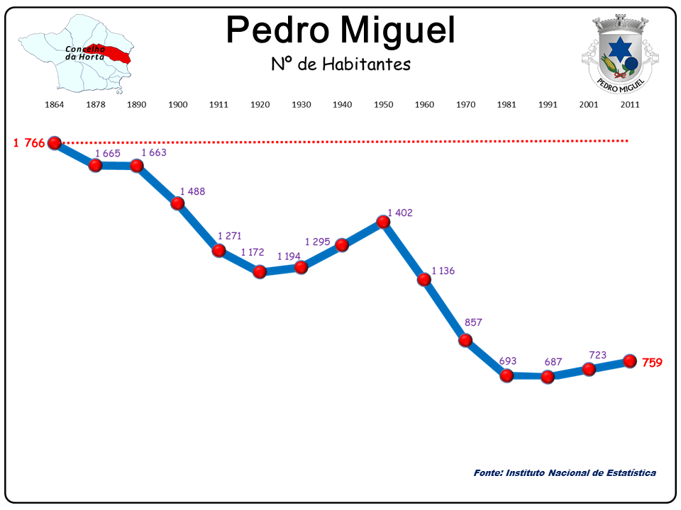 População